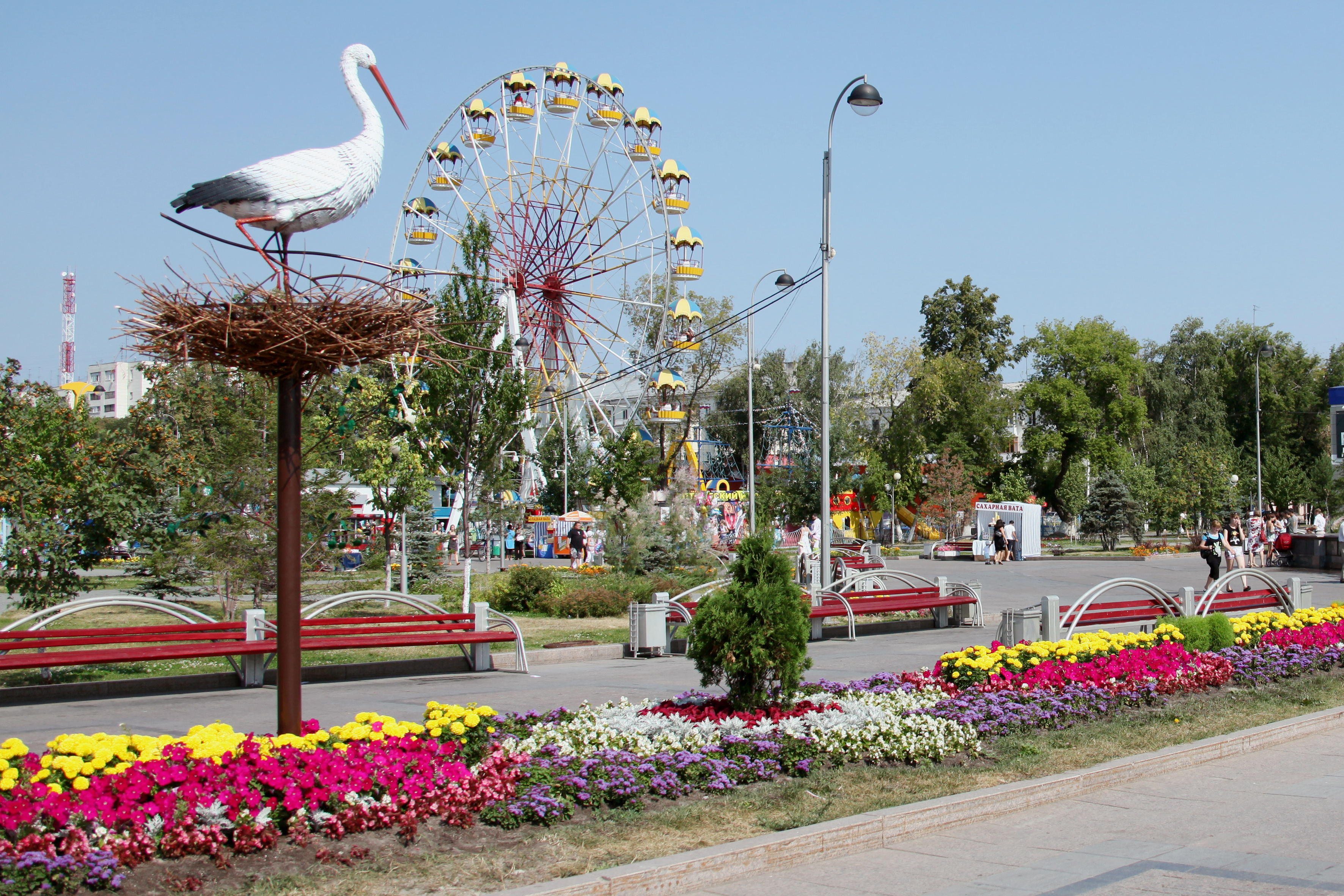 Kolora bulvardo. Tjumeno, Rusio.